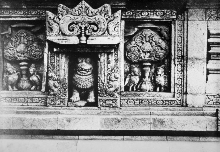 negatief. Reliëfs op de Candi Lara Jonggrang oftewel het Prambanan tempelcomplex